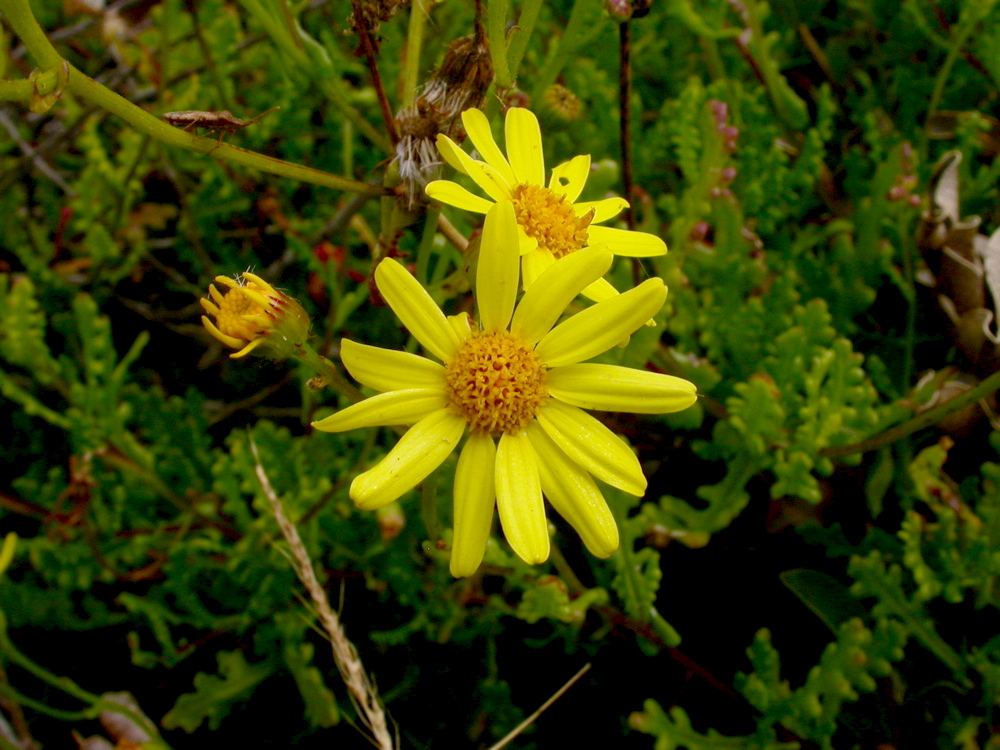 Senecio glabratus